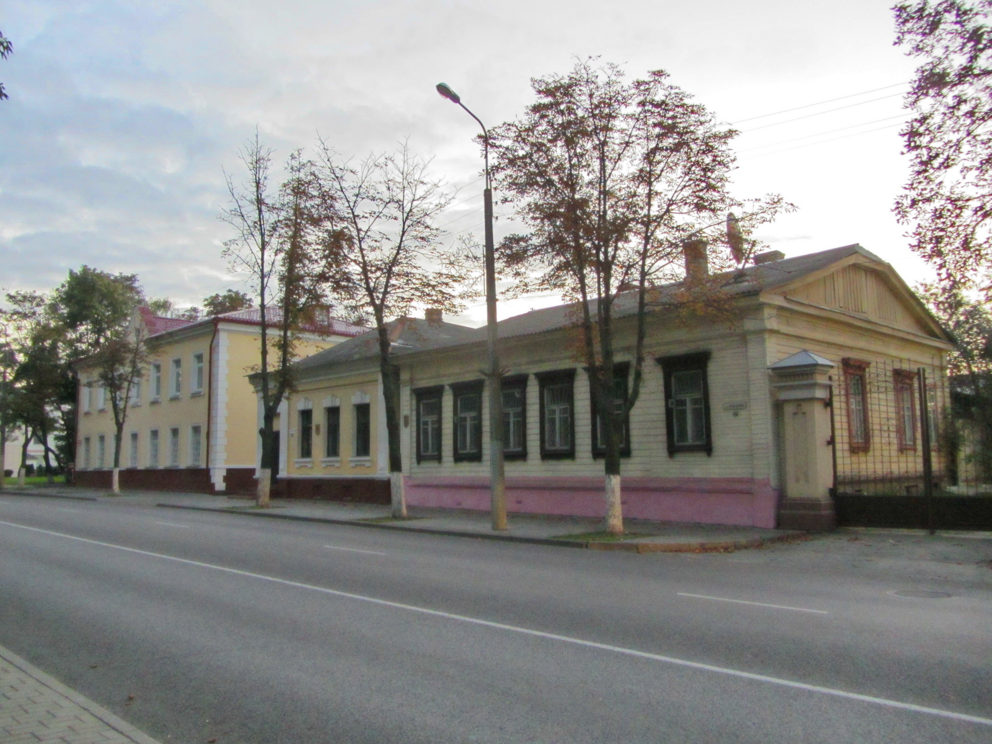 Беларуская (тарашкевіца): Забудова вул. Пралетарскай. г. Гомель This is a photo of Belarusian heritage monument. Reference number: 313Г000056 ( WLM)